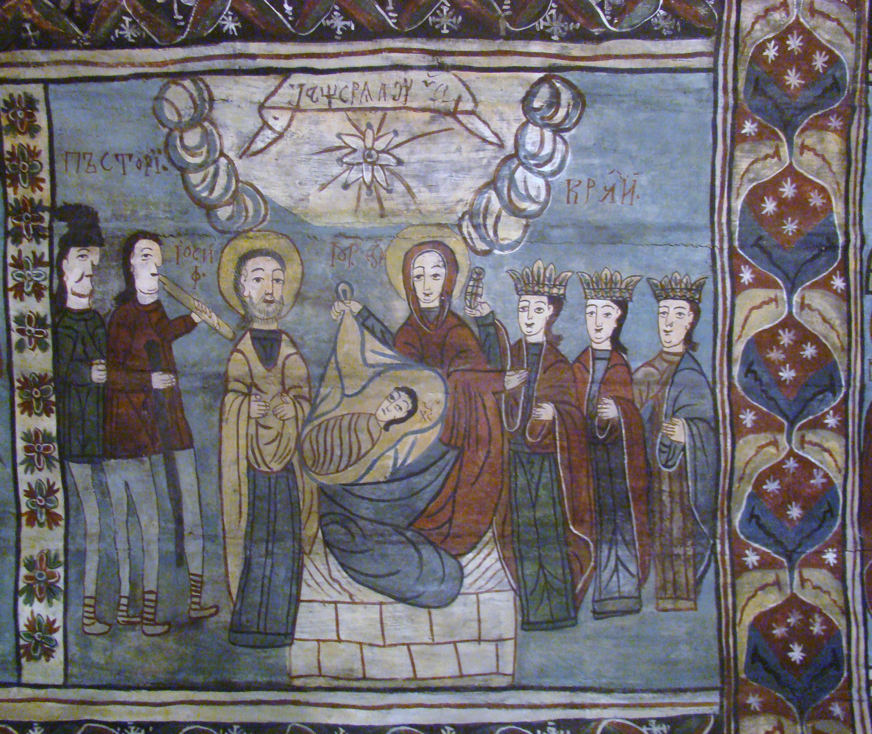 Biserica de lemn „Sf. Arhangheli Mihail şi Gavriil" din Tăuți, județul Cluj